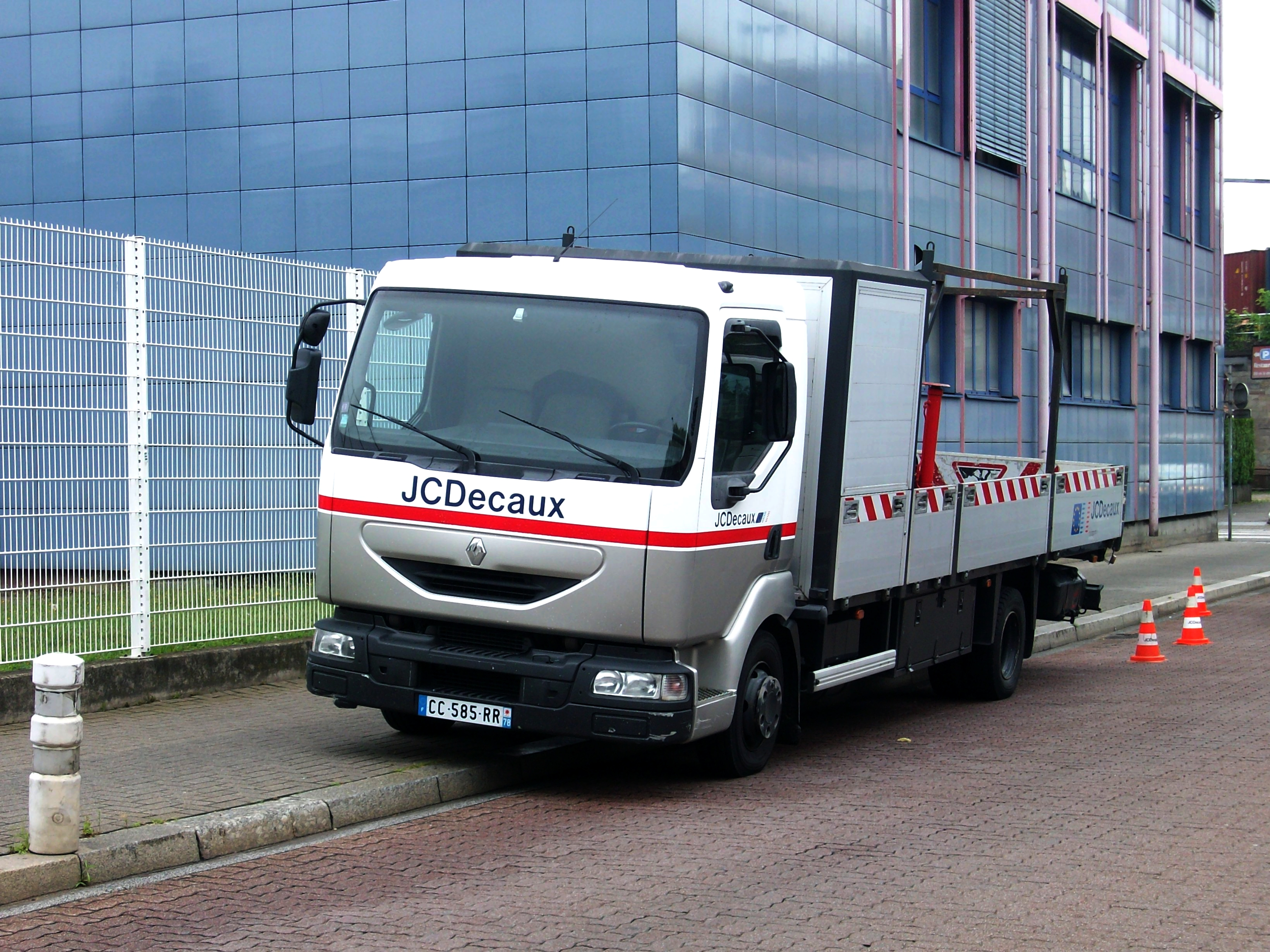 Camion JC Decaux, station Krimmeri-Meinau - Strasbourg